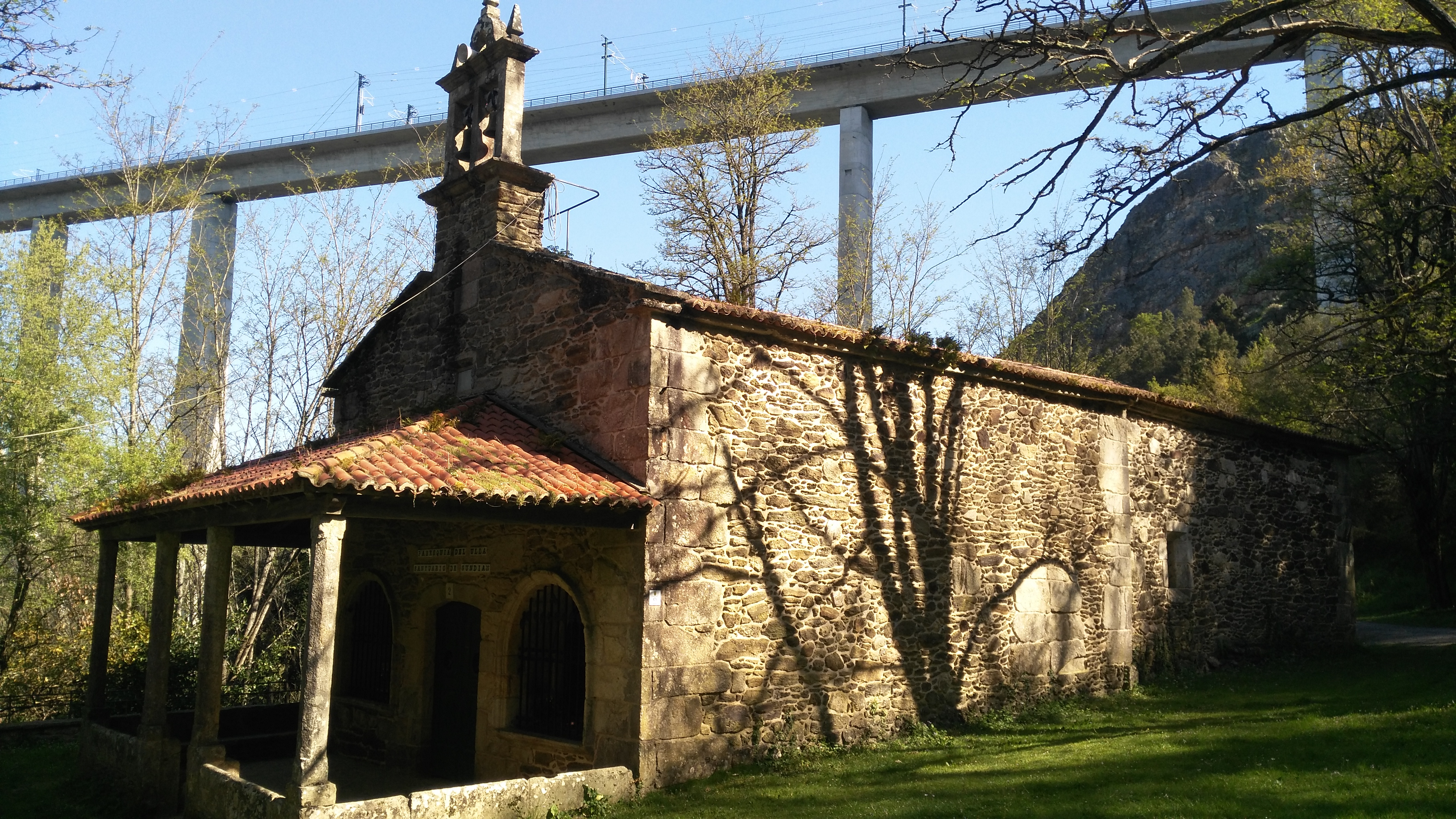 Santuario de Gundián